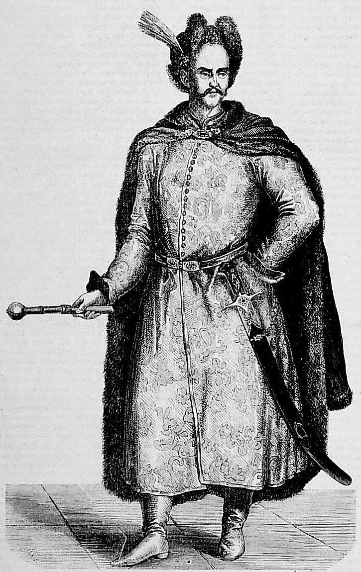 Józef Bogusław Słuszka 1652-1701